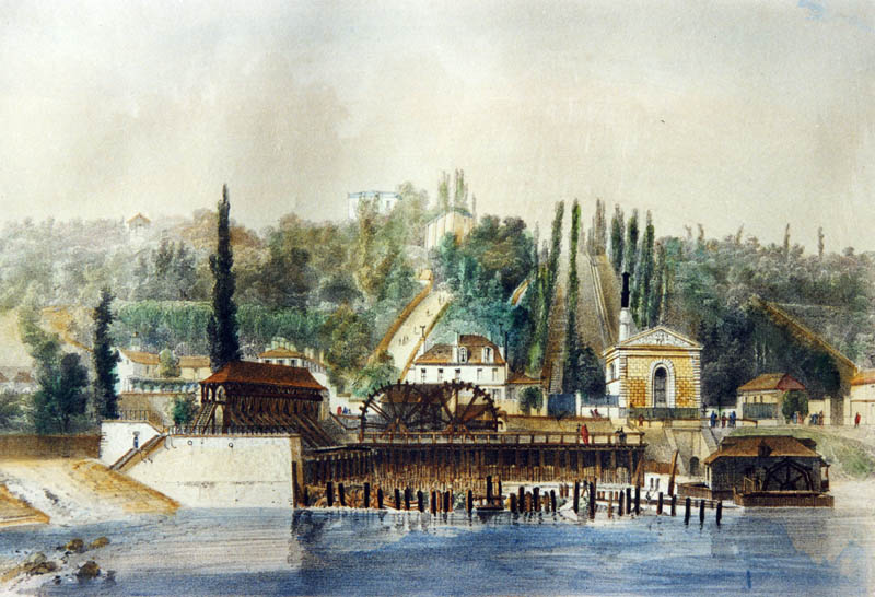 Die Überreste der Maschine von Marly mit der 1827 erbauten dampfgetriebenen Pumpanlage